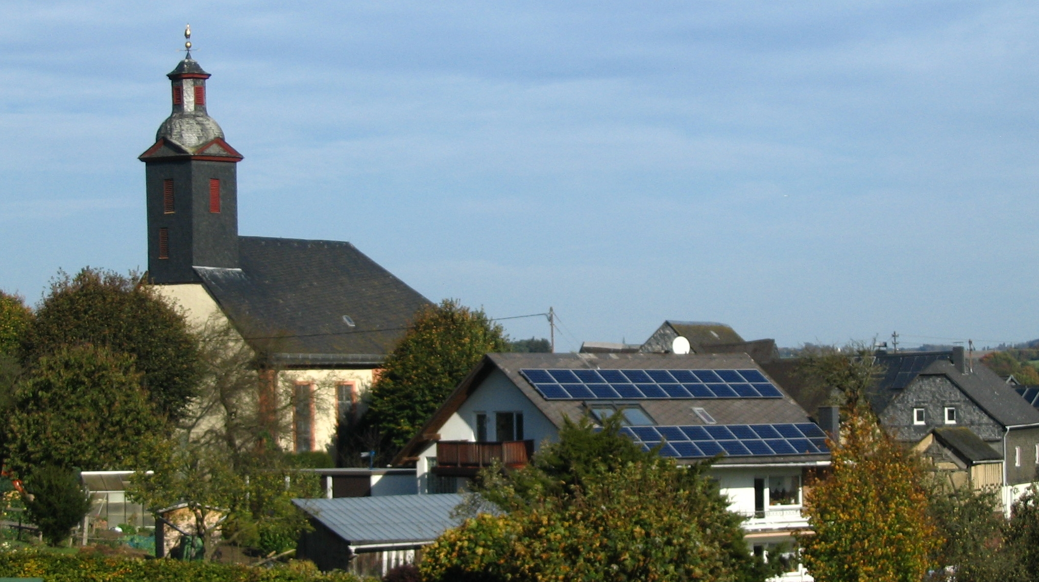 ev. Kirche Ober Kostenz im Hunsrück